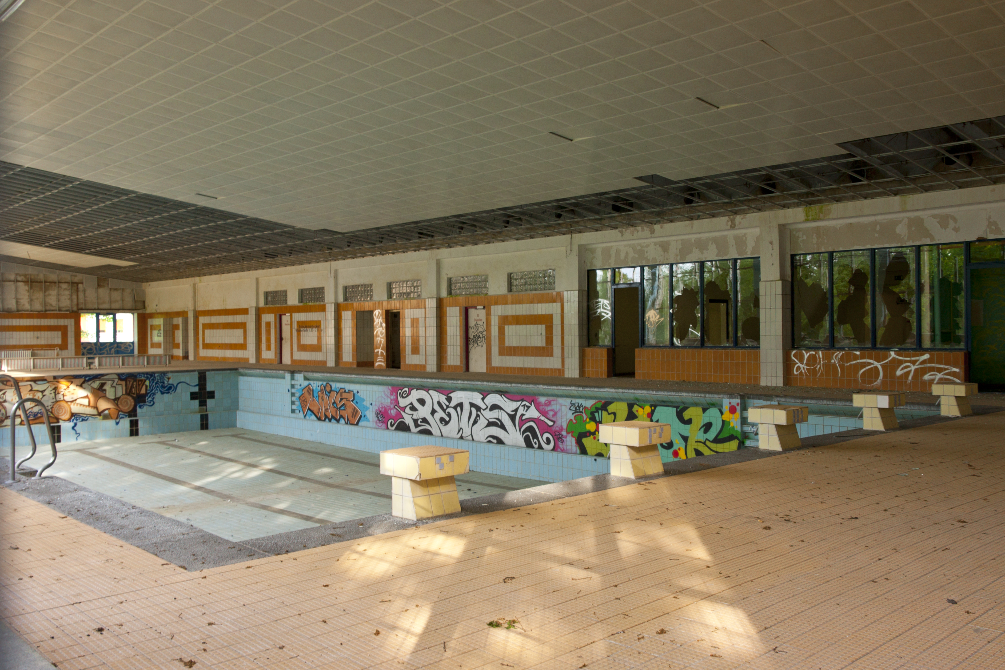 Schwimmbecken in der Volksschwimmhalle Lankow (Schwerin) vor der Sanierung